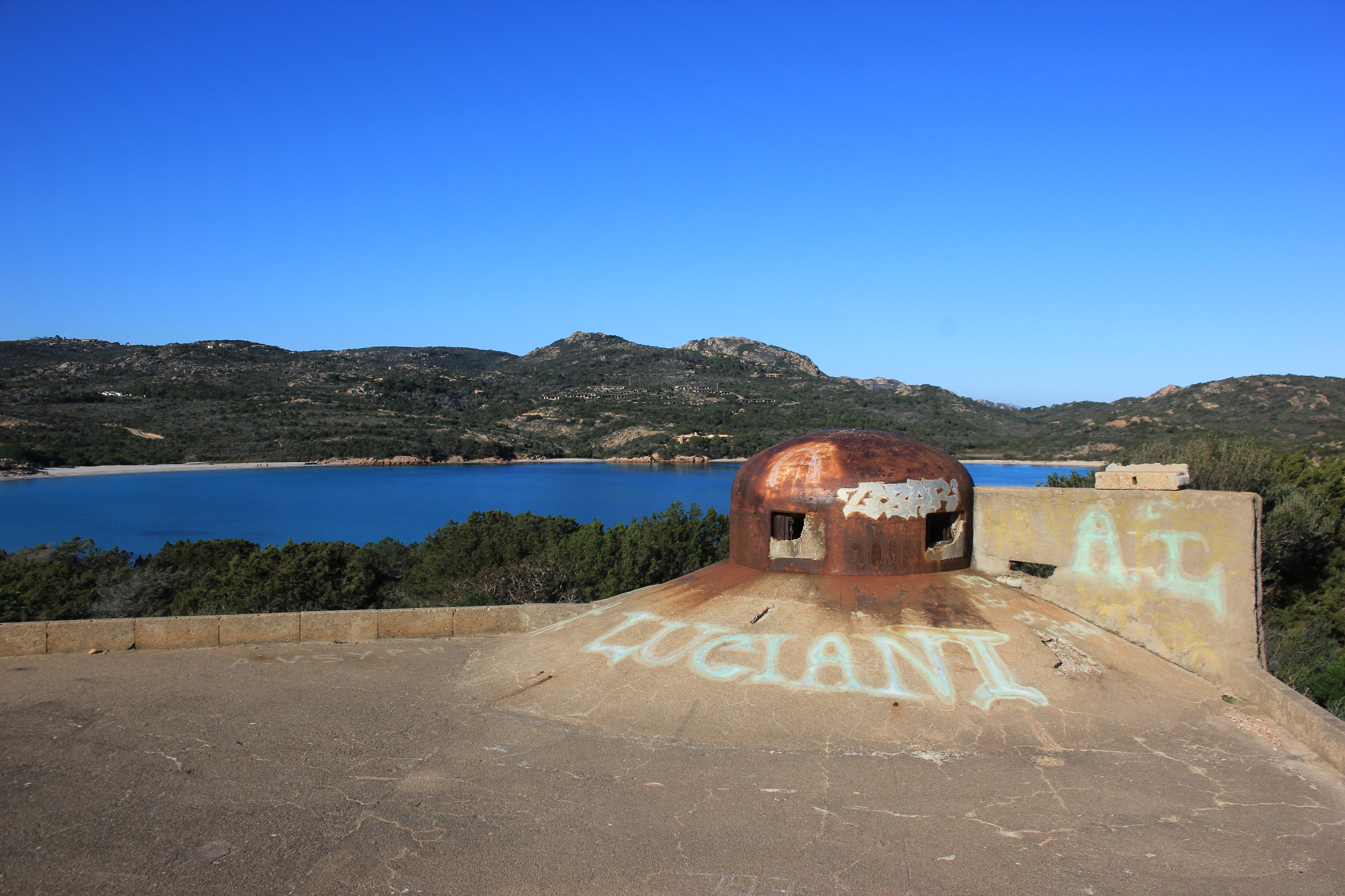 Bunker von Rondinara auf Korsika